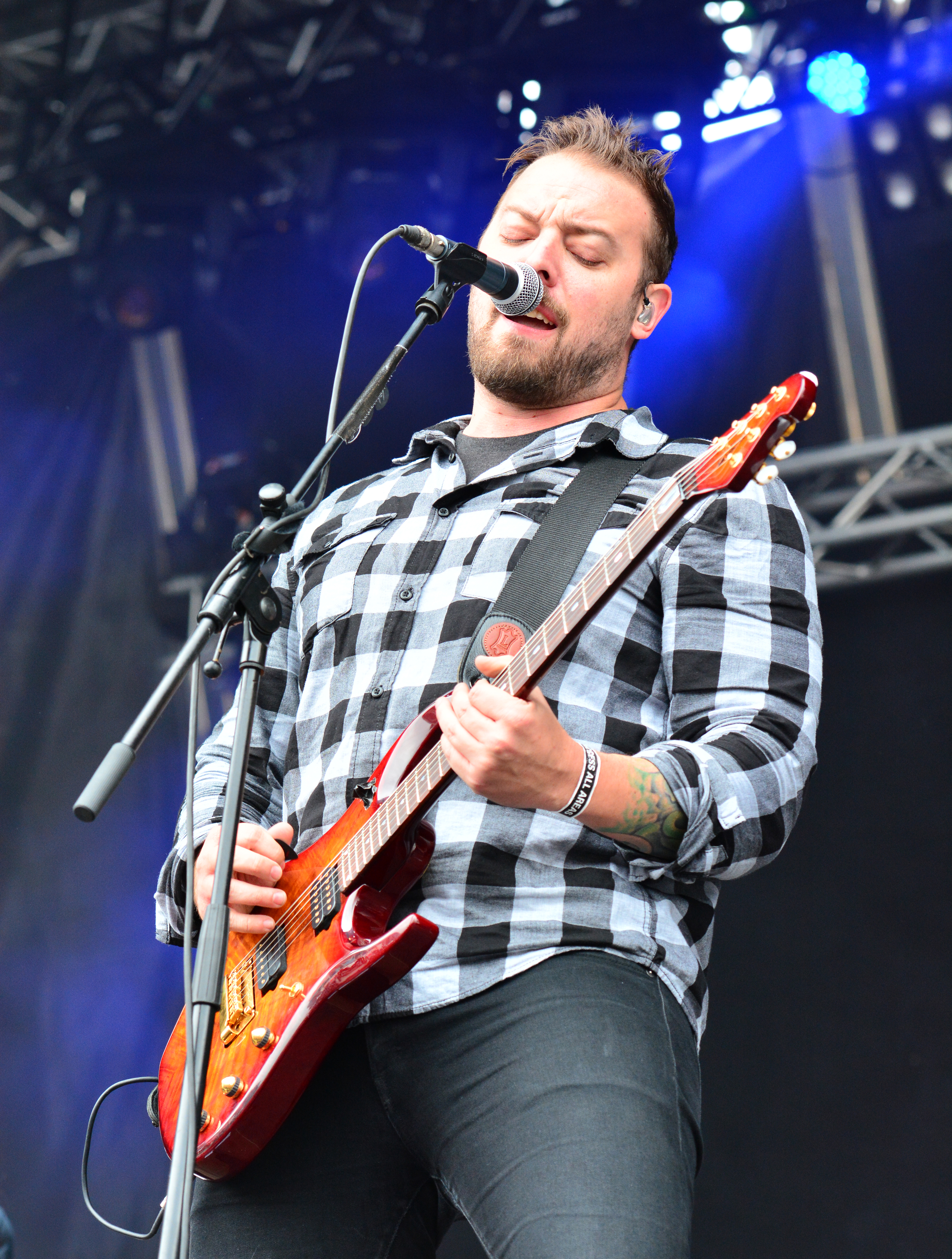 Gitarrist und Sänger Shane Blay von Wovenwar beim Elbriot 2014